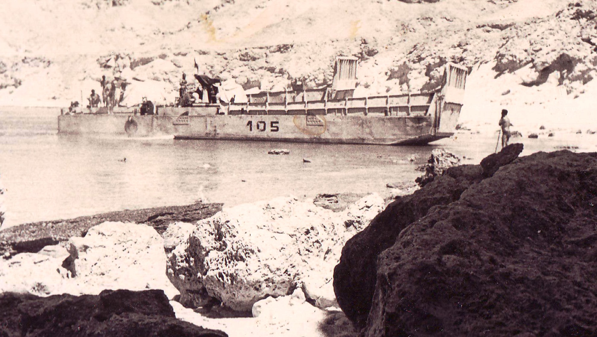 נחתת מכוניות ששימשה בסיס לחיפוש מוקשים במיצרי טירן